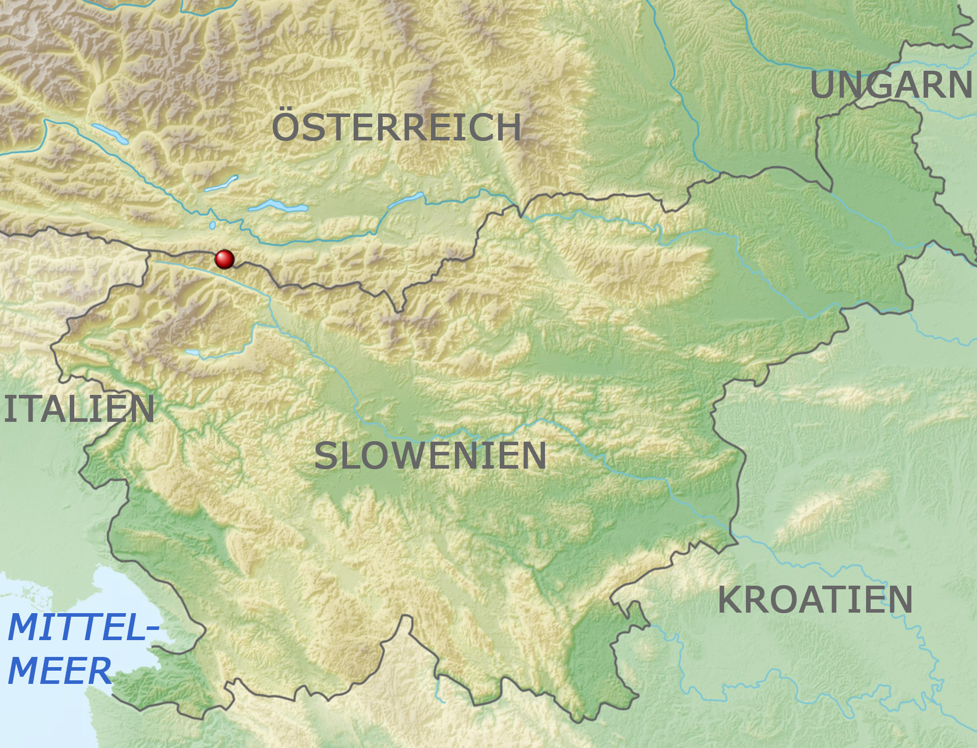 Reliefkarte Slowenien Kärnten Topographischer Hintergrund: NASA Shuttle Radar Topography Mission (public domain). SRTM3 v.2.